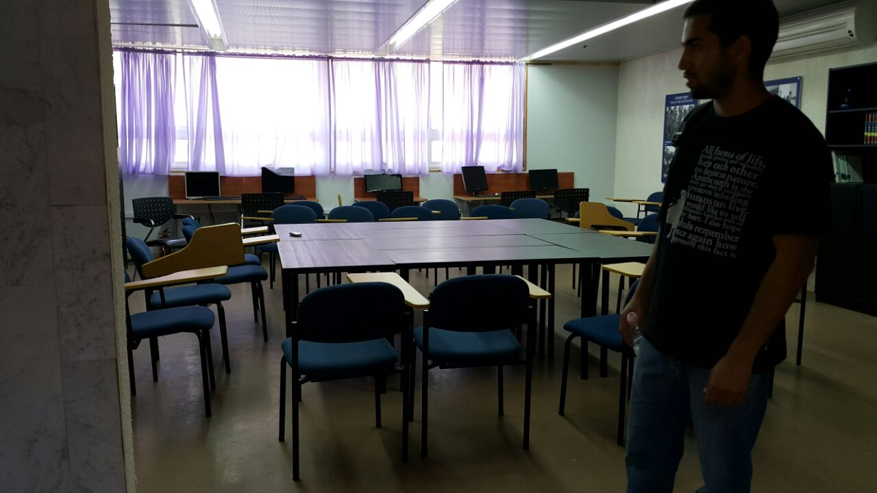 הכיתה שבה רוכזו הילדים במעלות ושם נטבחו